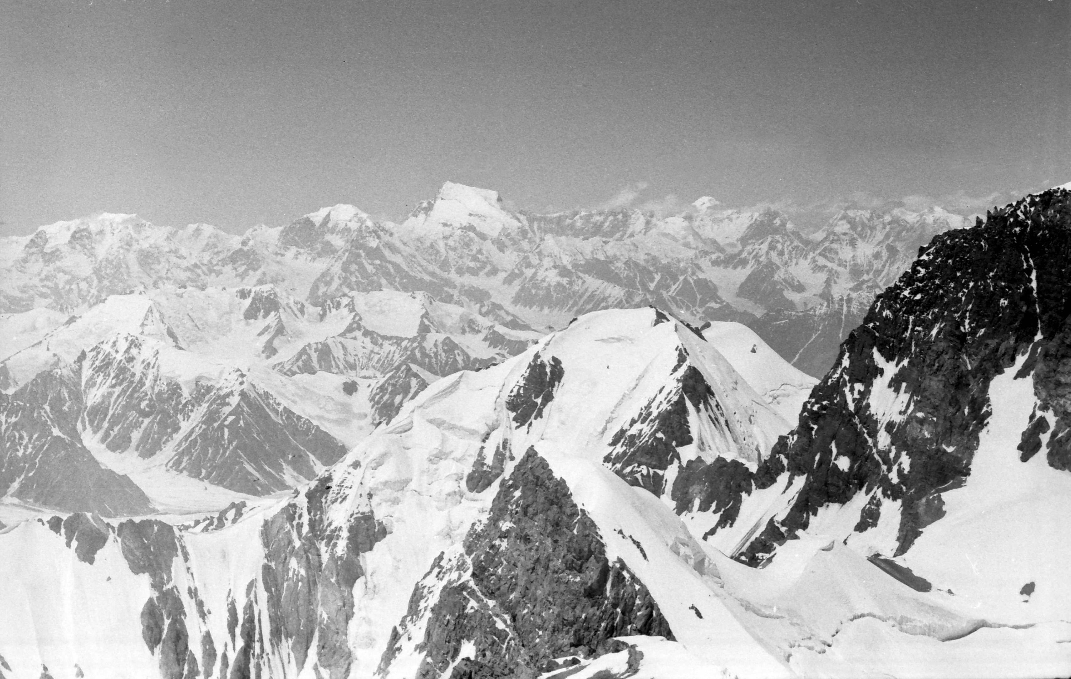 Ekspeditsioon mäetipule "Tartu Ülikool 350". Vaade Kommunismile.